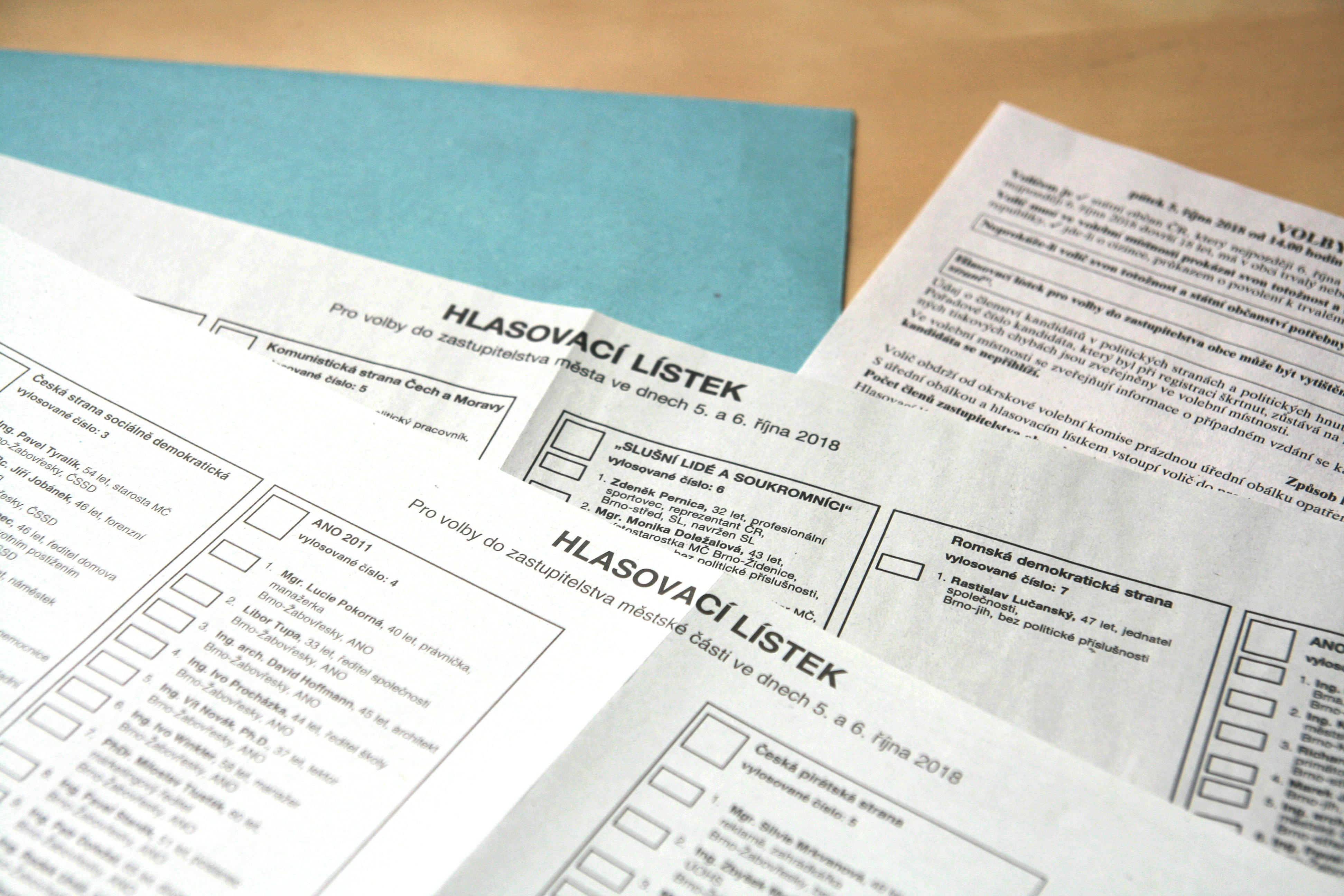 Obálka s hlasovacími lístky pro komunální volby v říjnu 2018, verze pro statutární město Brno a jeho městskou část.